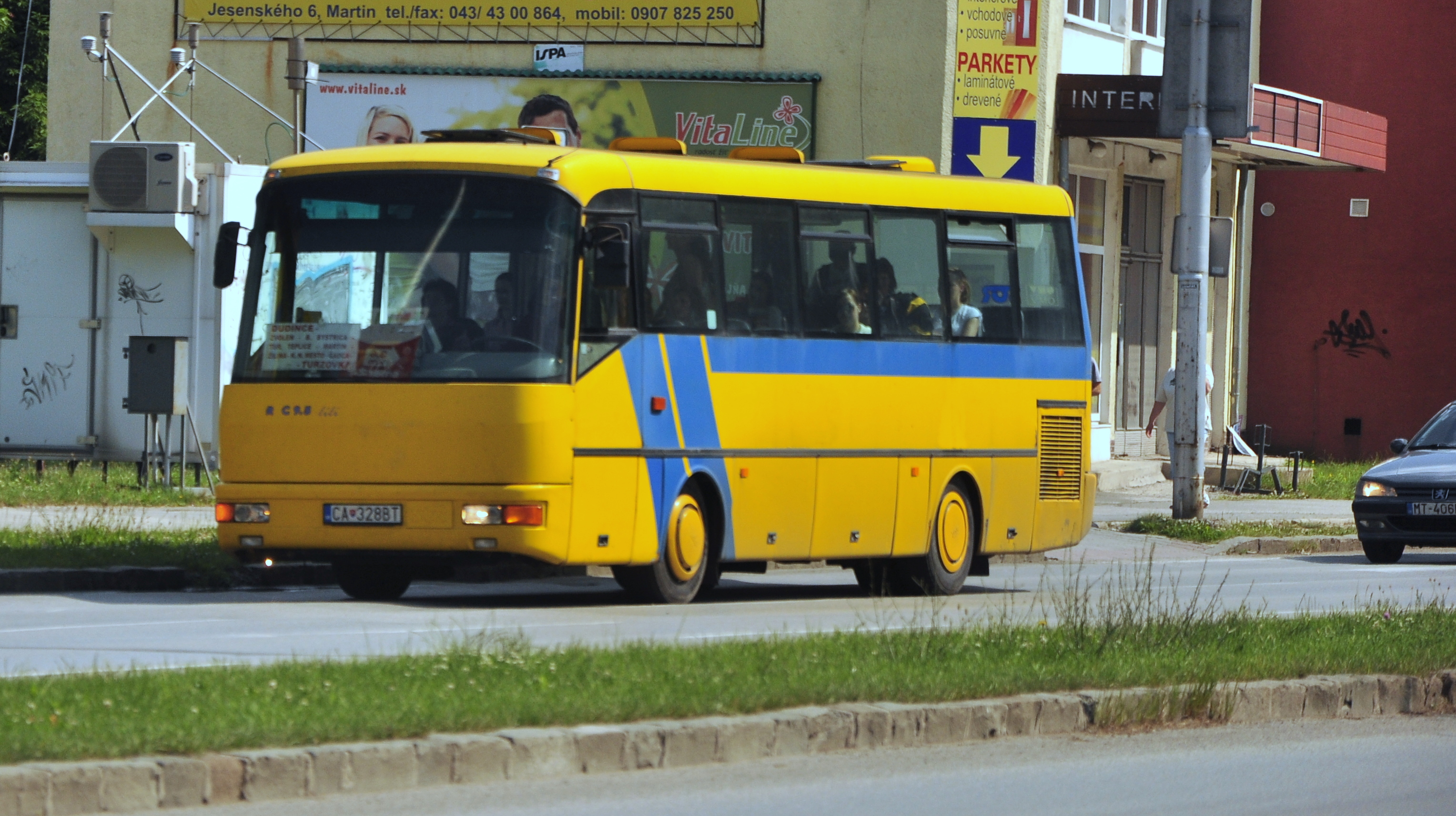 Autobus SOR 9,5 dopravcu Kysučan Expres